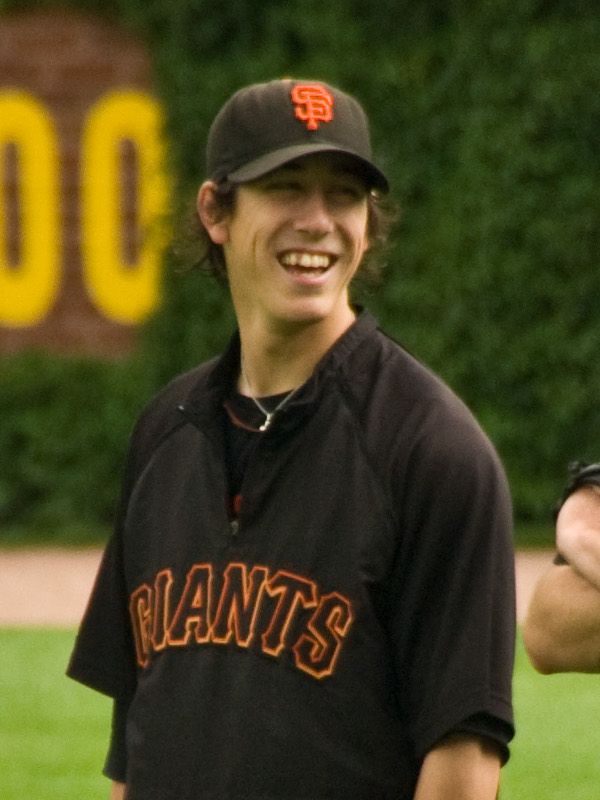 Tim Lincecum